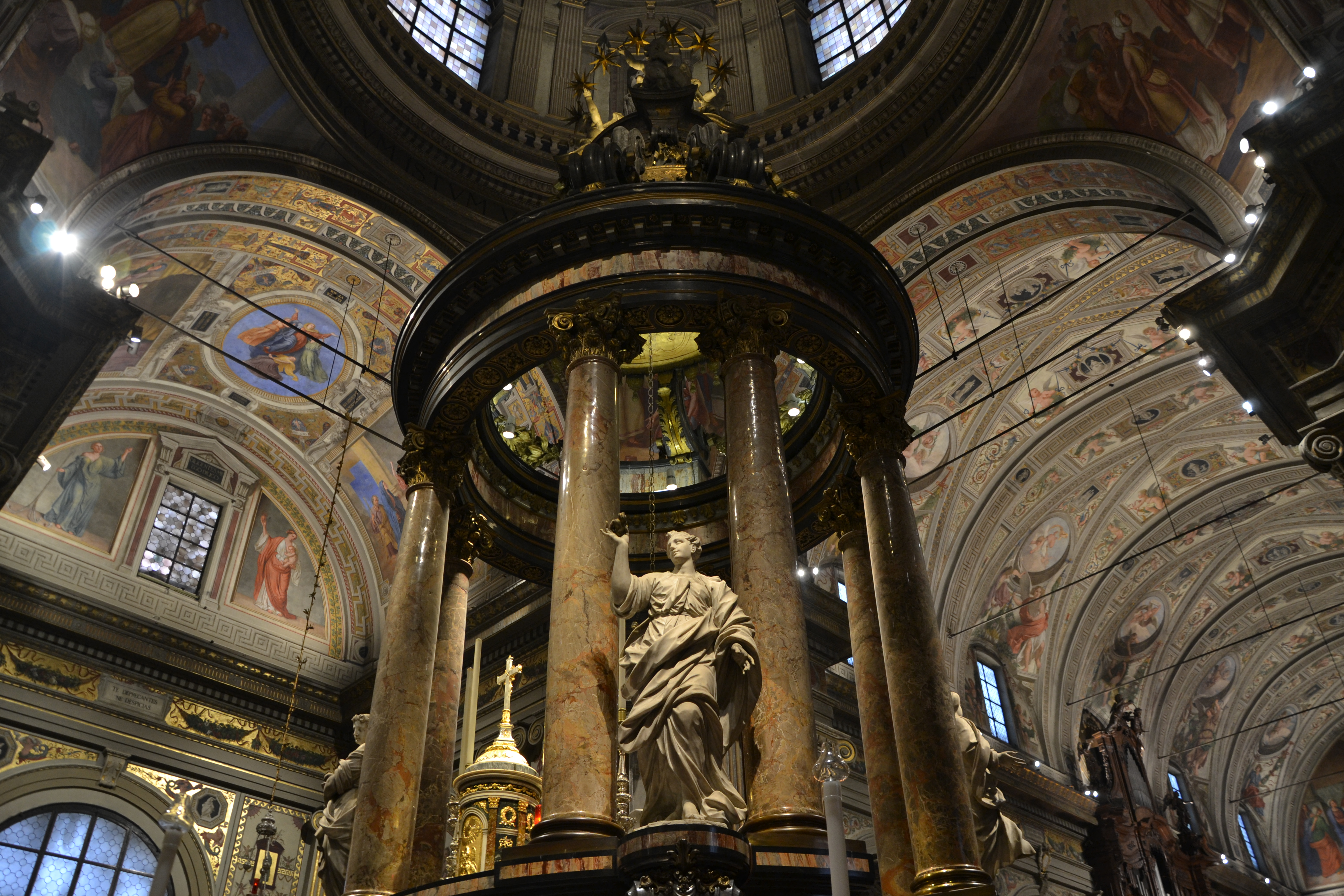 Sanctuary of Caravaggio - Main Altar by Filippo Juvarra